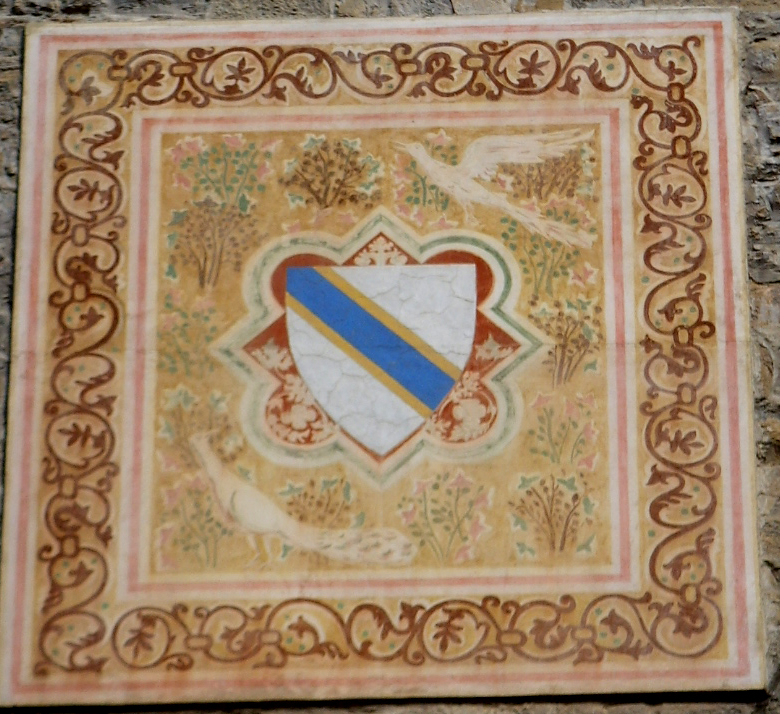 Palazzo sassetti stemma2